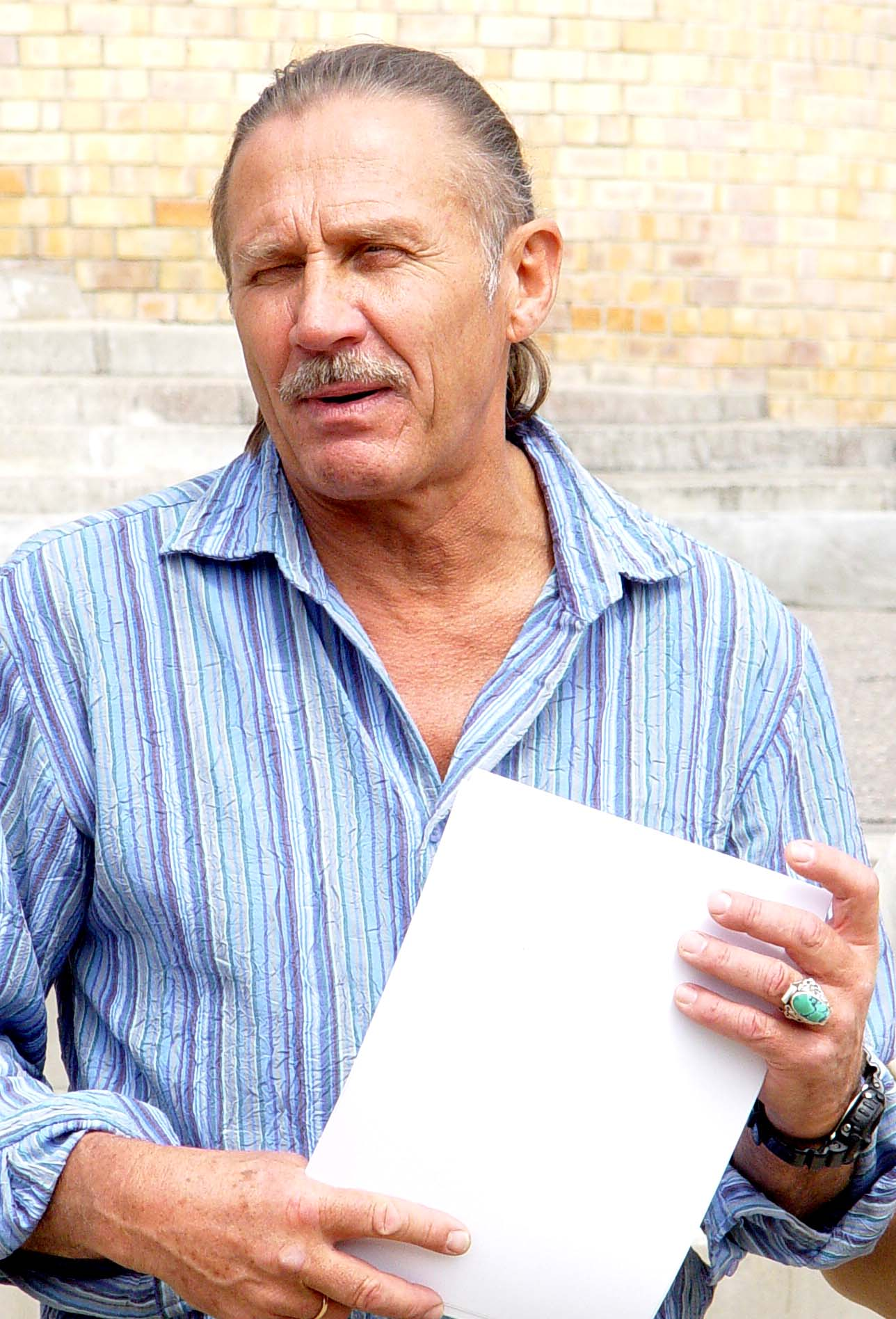 Teodors Ķirsis